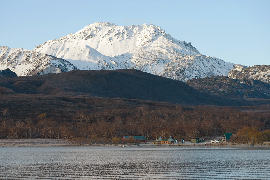 Вулкан Дикий Гребень